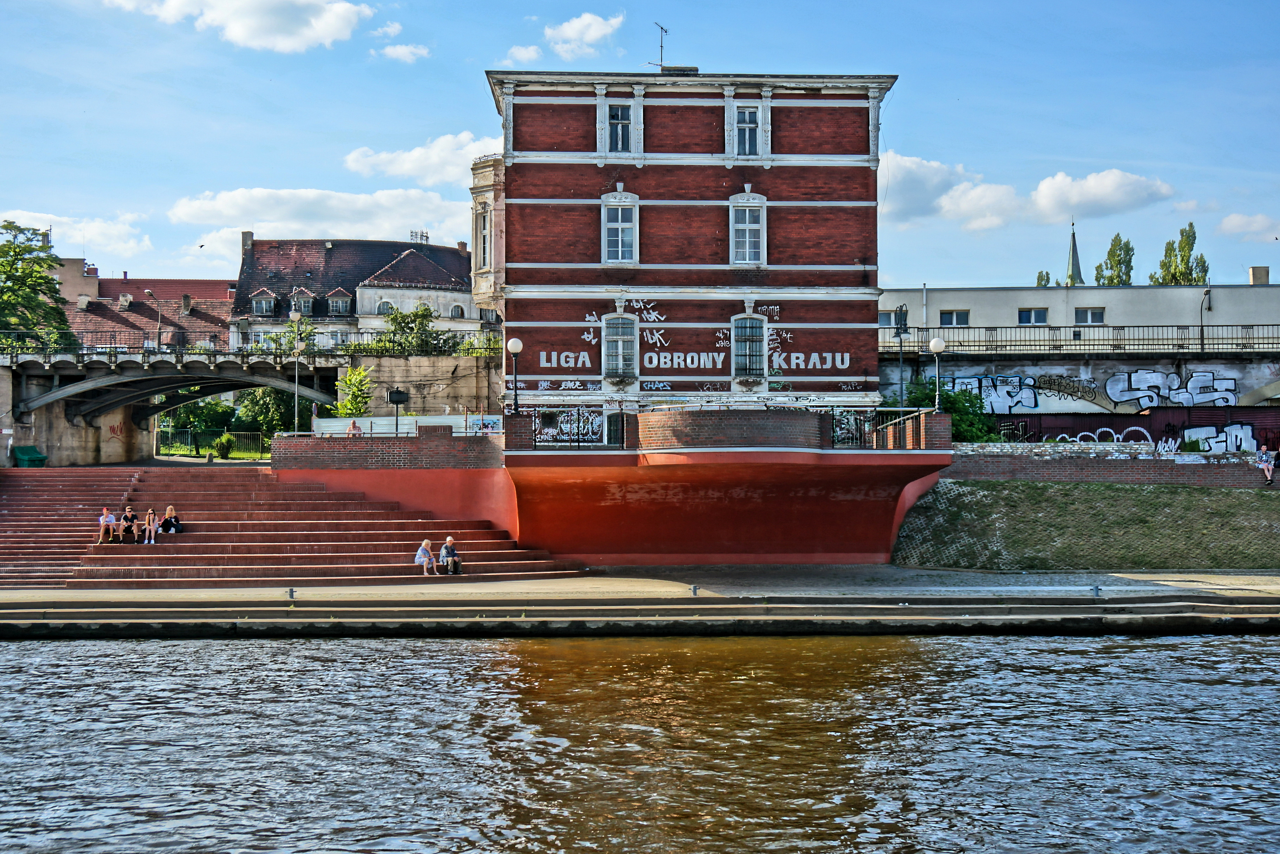 Gorzów Wielkopolski, willa, 1900